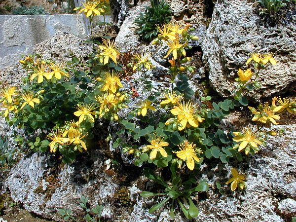 voir texte existant